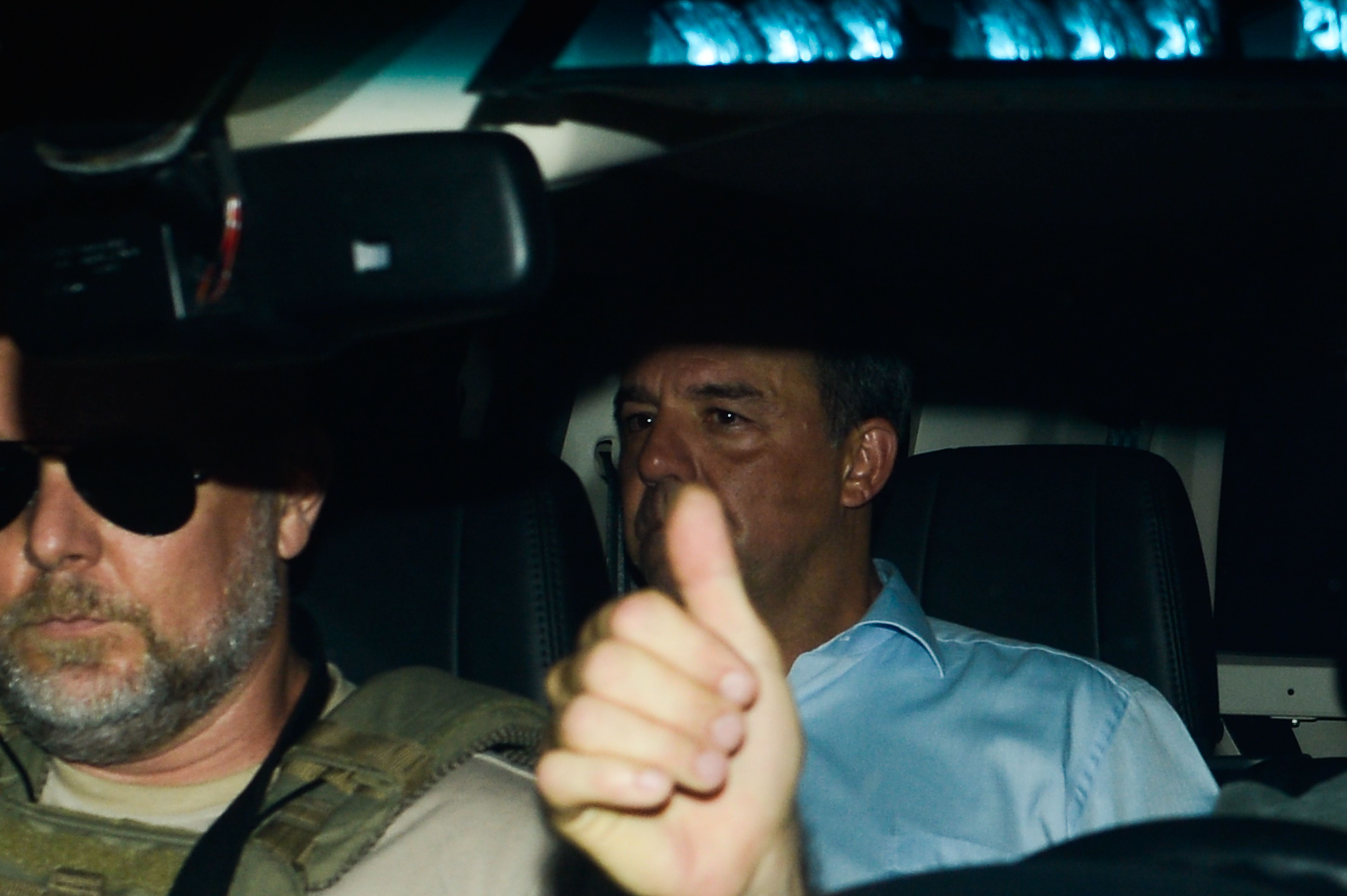 Ex-governador do Rio de Janeiro Sérgio Cabral sendo preso na Operação Calicute, 37ª fase da Operação Lava Jato.